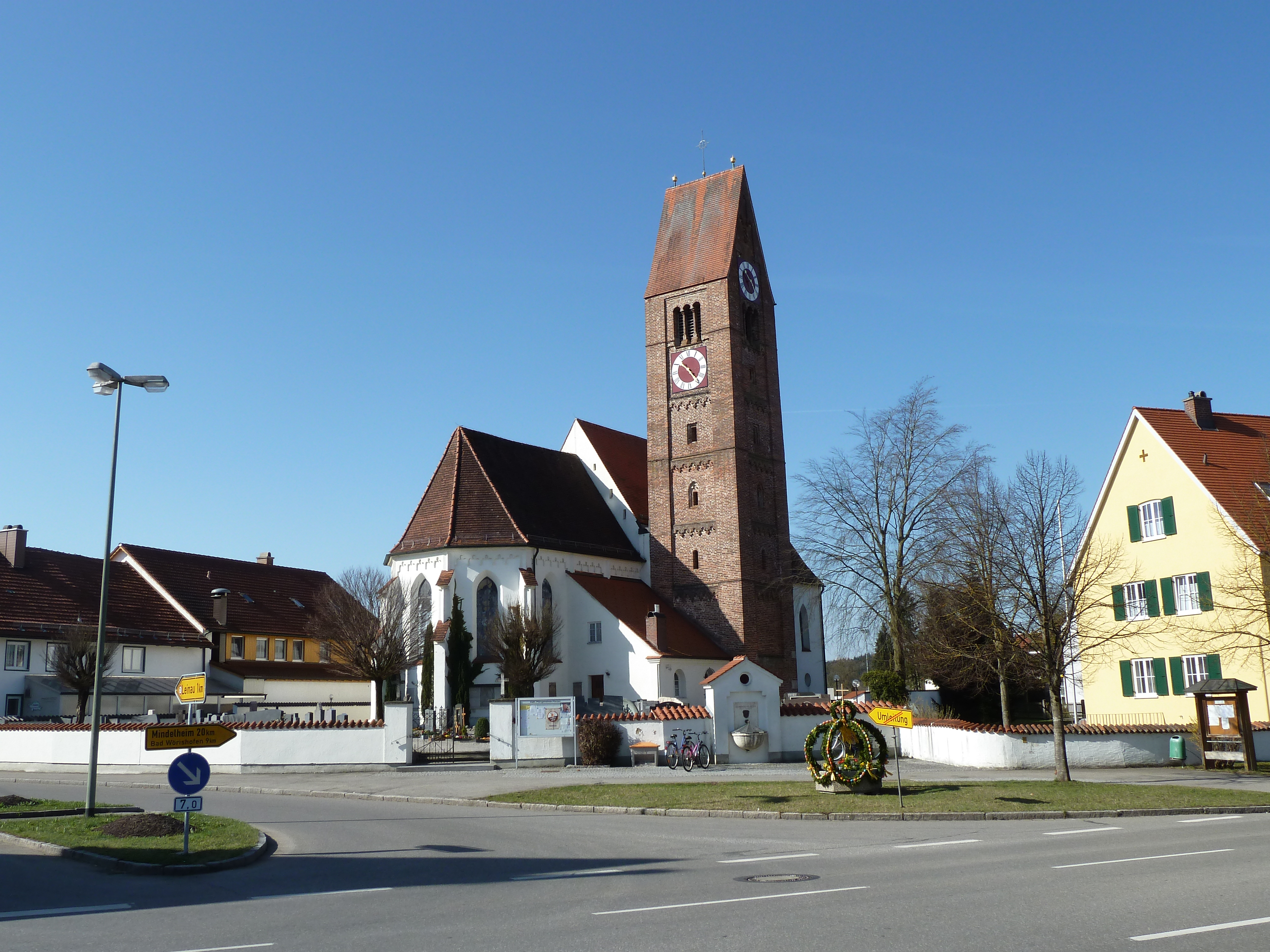 Pforzen Church St. Valentin